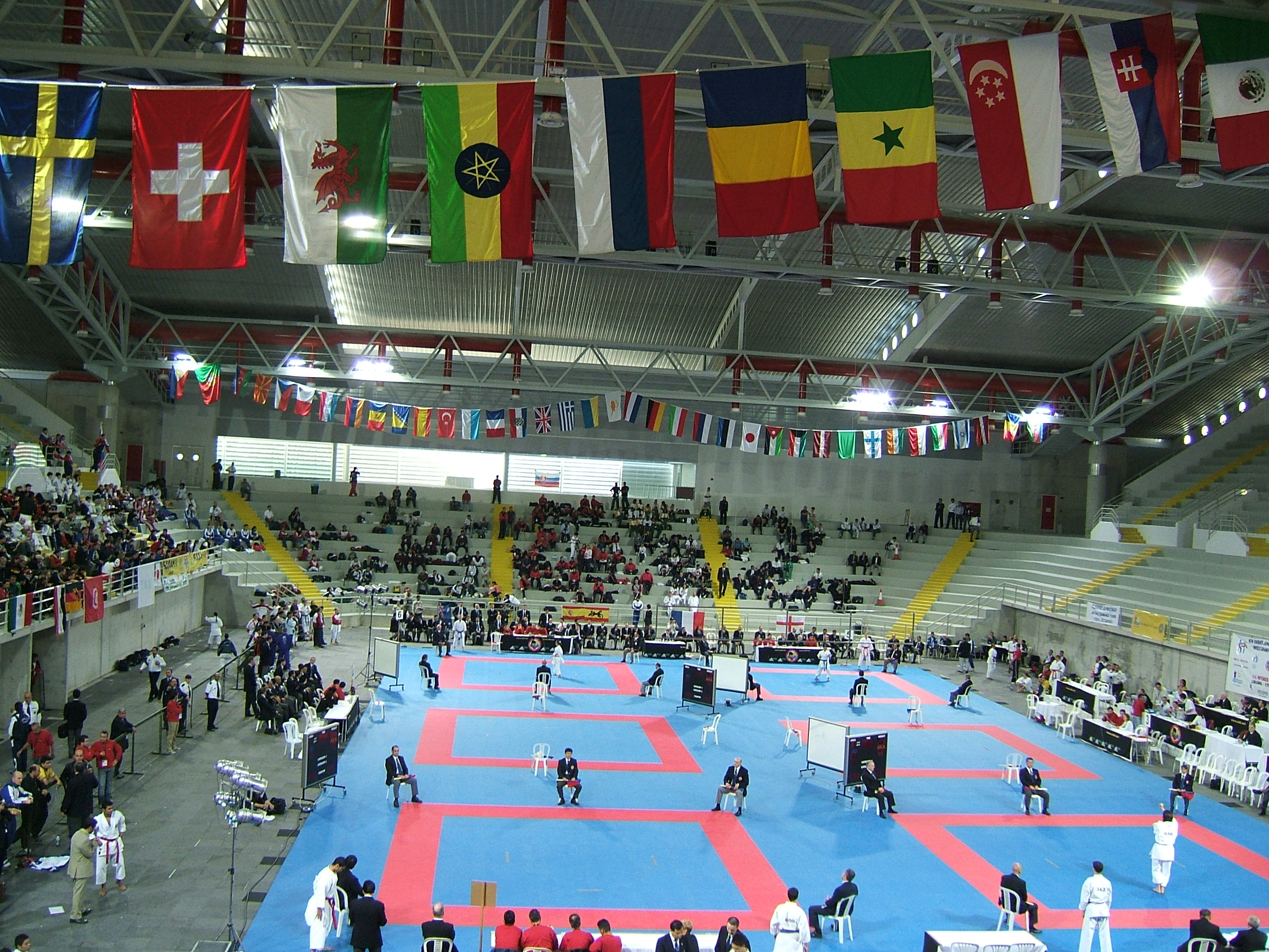 Vue générale du dojo aux championnats du monde de karaté juniors et cadets 2005 organisés à Limassol